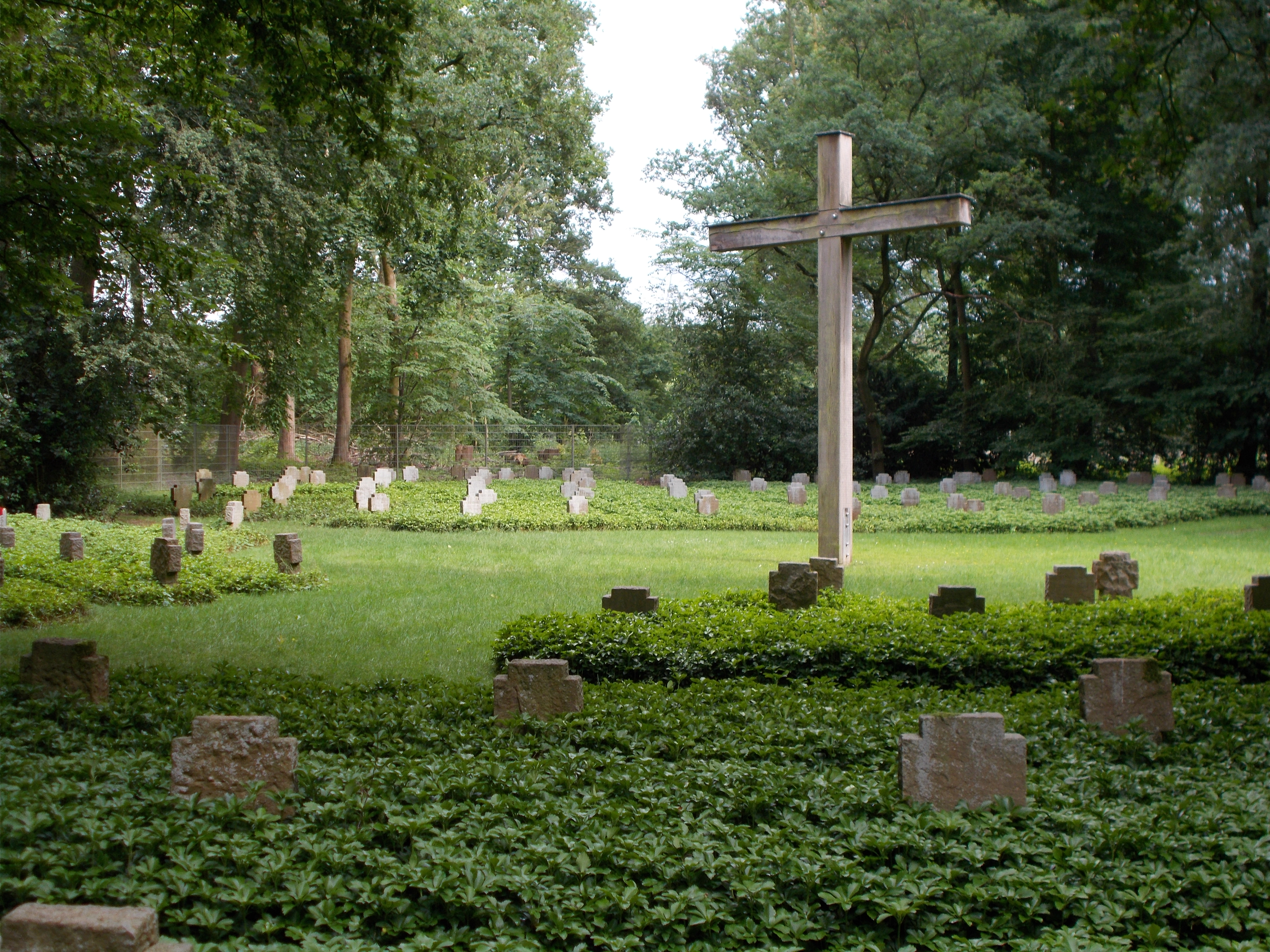 Deutscher Soldatenfriedhof am Niersenberg in Kamp-Lintfort. Friedhof und Kreuz.